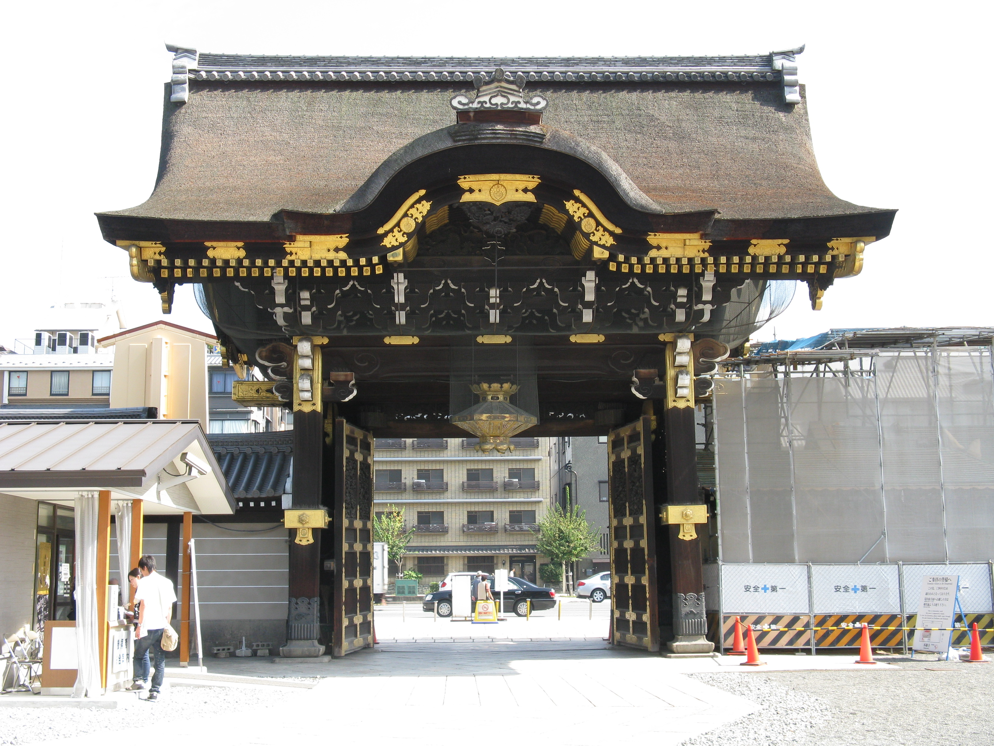 西本願寺 阿弥陀堂門